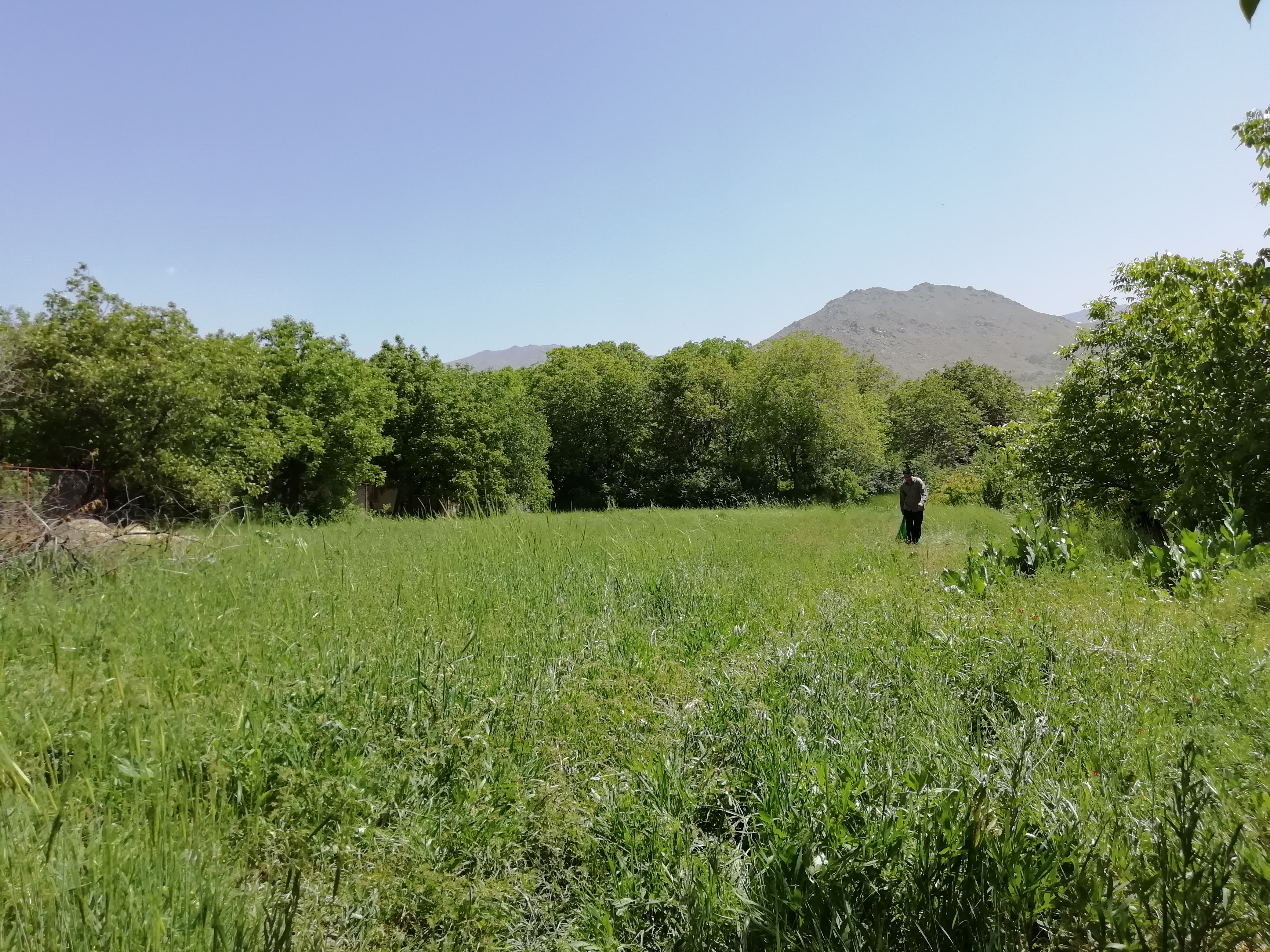 باغ های سرکان